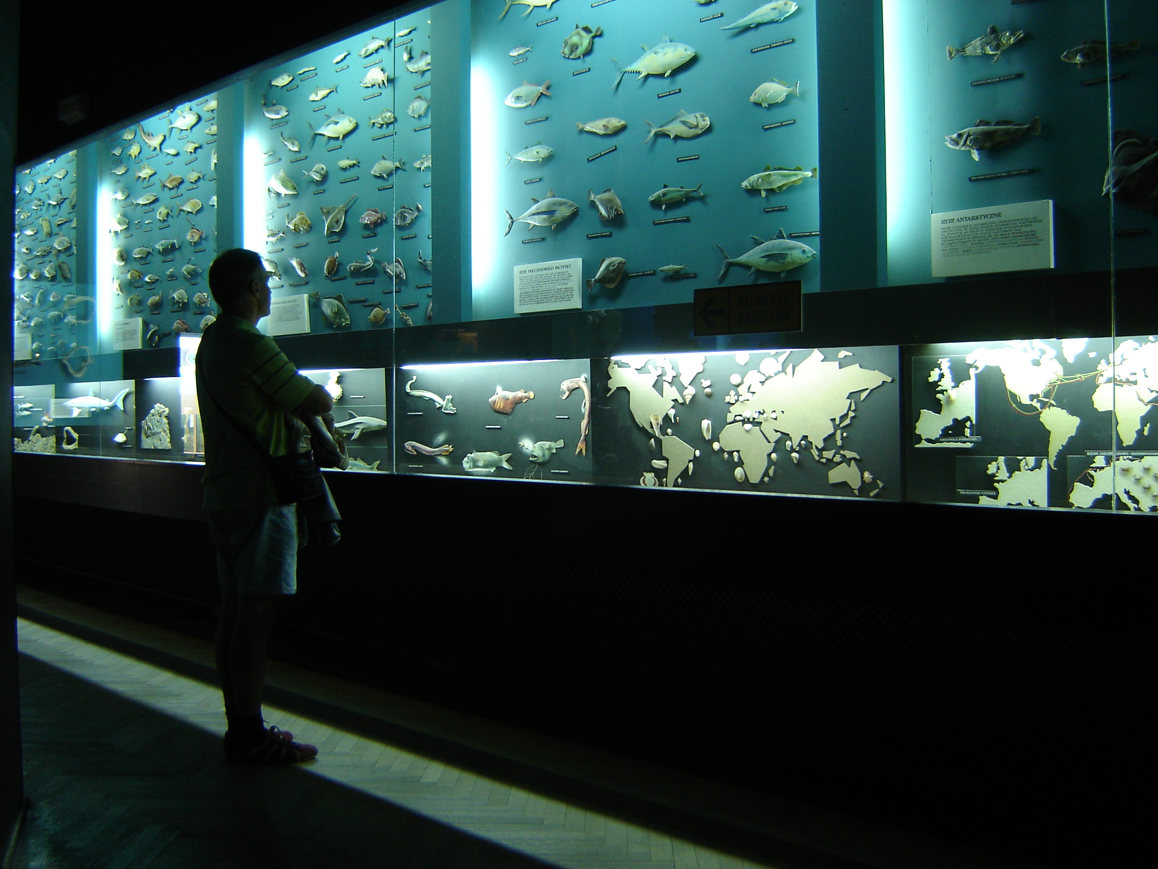 Gdynia Aquarium